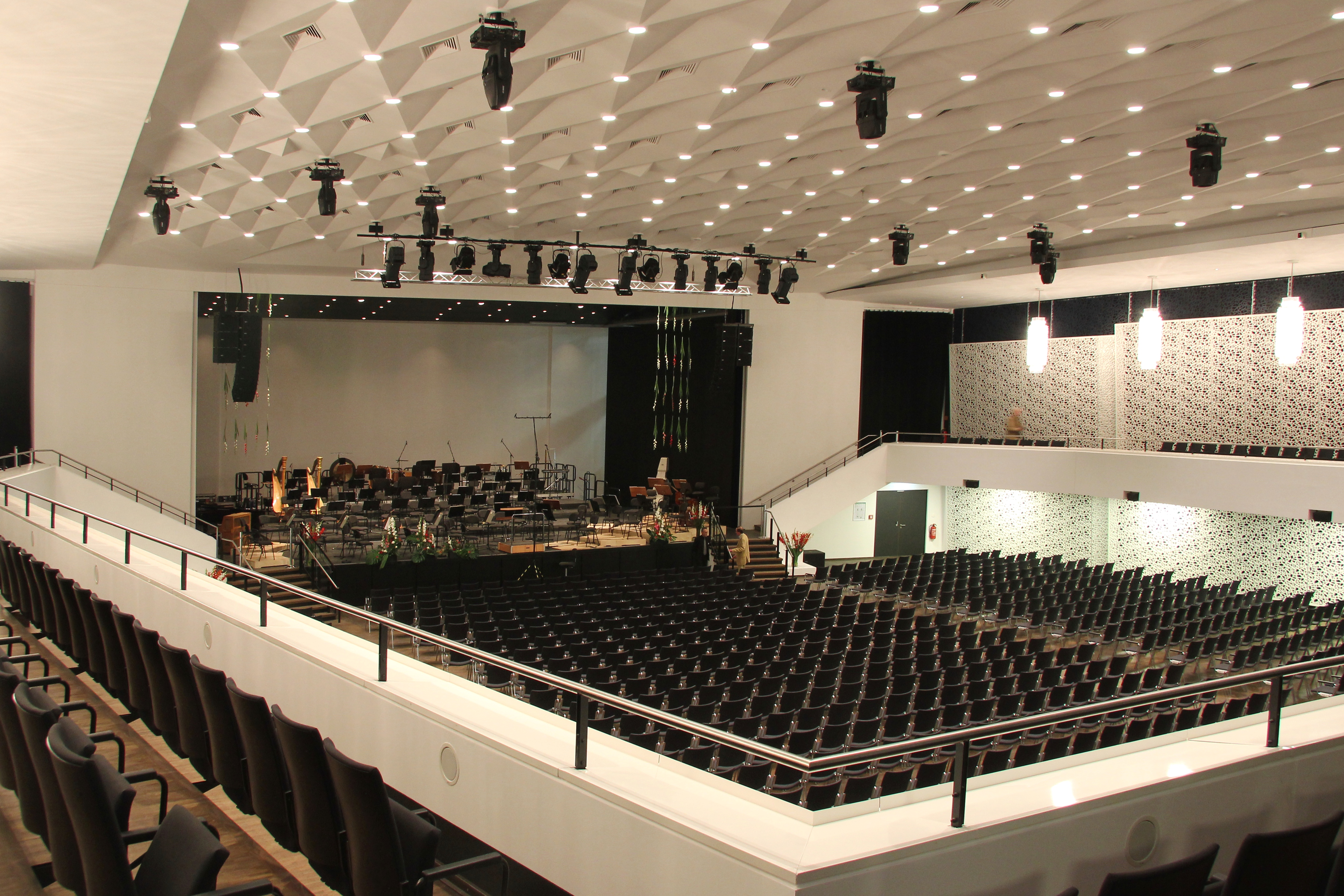 Großer Saal der Rhein-Mosel-Halle in Koblenz nach dem Umbau, Blick von der Empore aus